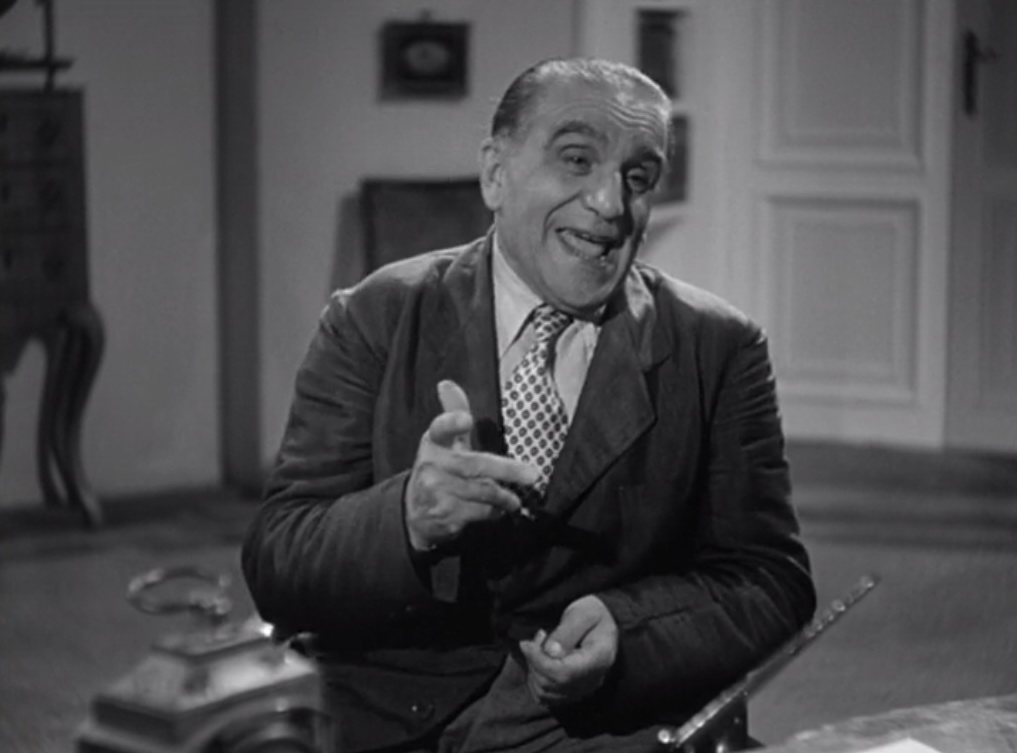 Screenshot dal film La vispa Teresa (1943)